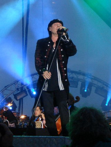 Klaus Meine beim Konzert 26.08.2006 in Berlin